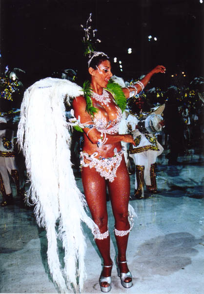 Reine de batterie de l'école Rocinha